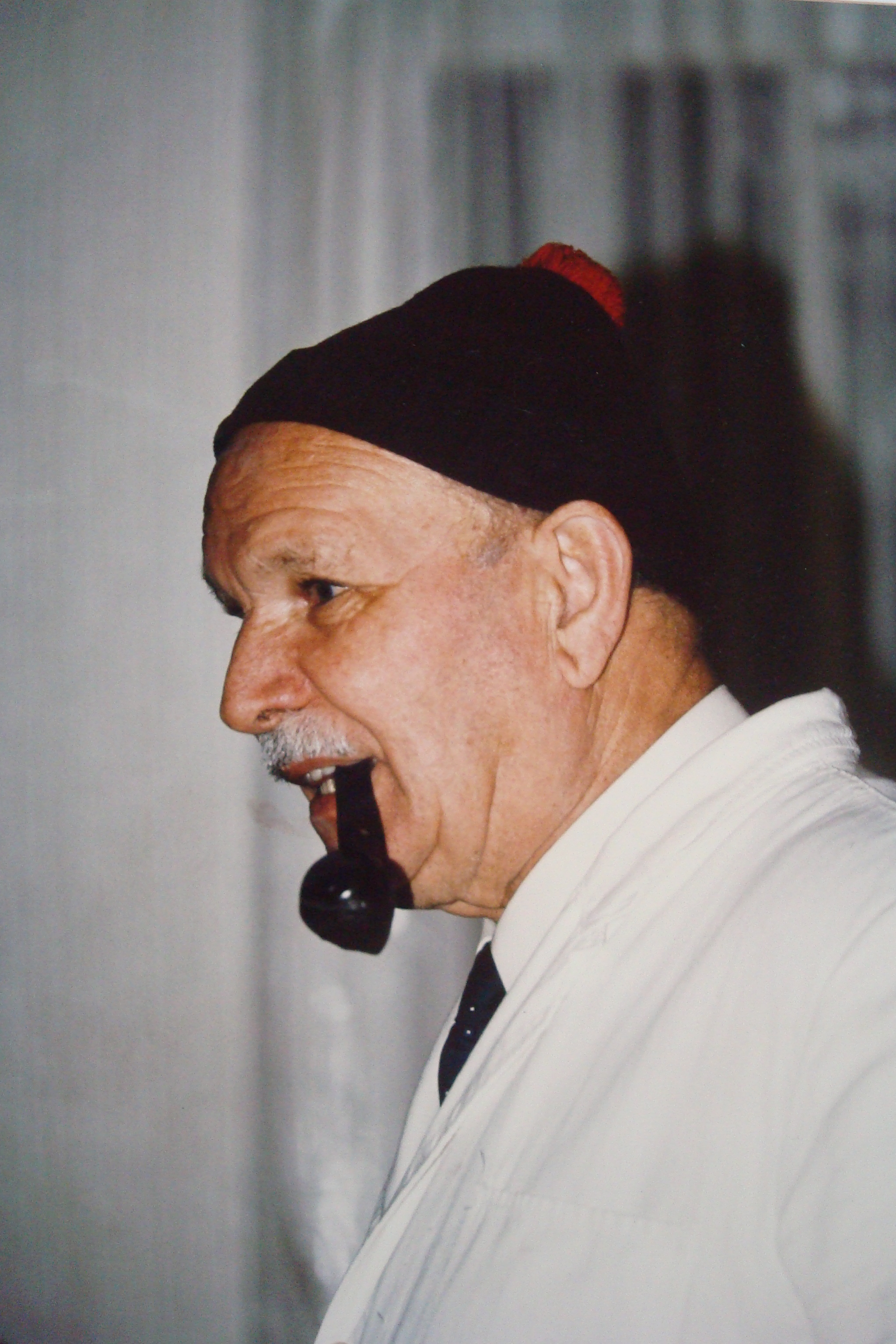 Robs Mayer, Porträt